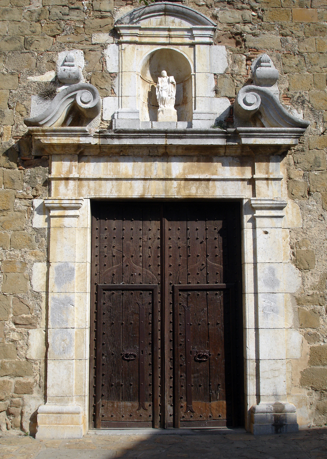 Esglèsia de Santa Eulàlia d'Ultramort (Girona, Catalunya, Espanya)